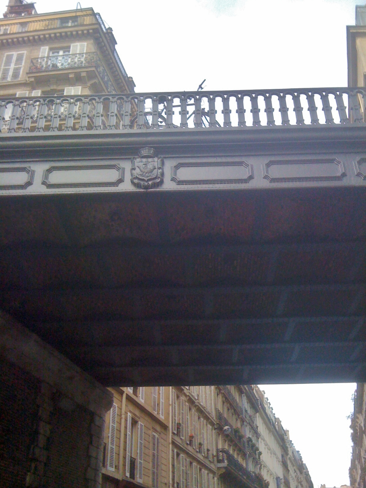 Paris 9e arrondisement - Rue Pierre-Semard - pont de la rue de Bellefond - armoiries de Paris